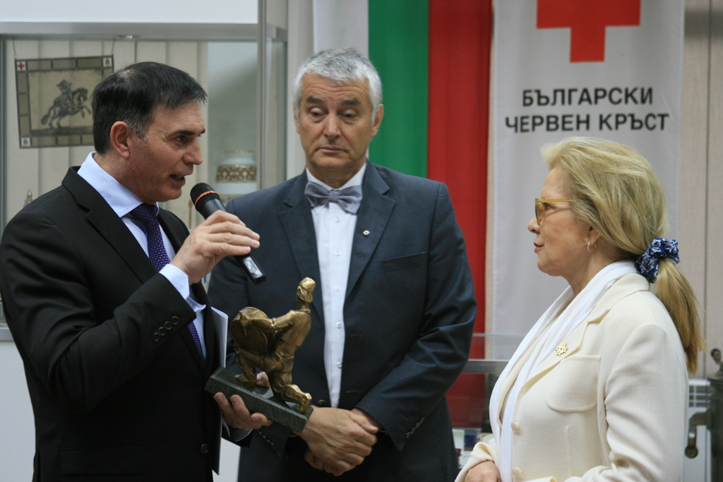 Димитър Куцаров със Силви Вартан